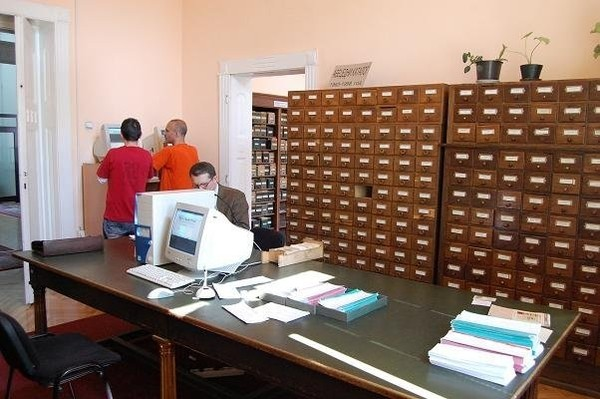 Српски (ћирилица): Лисни каталог 01